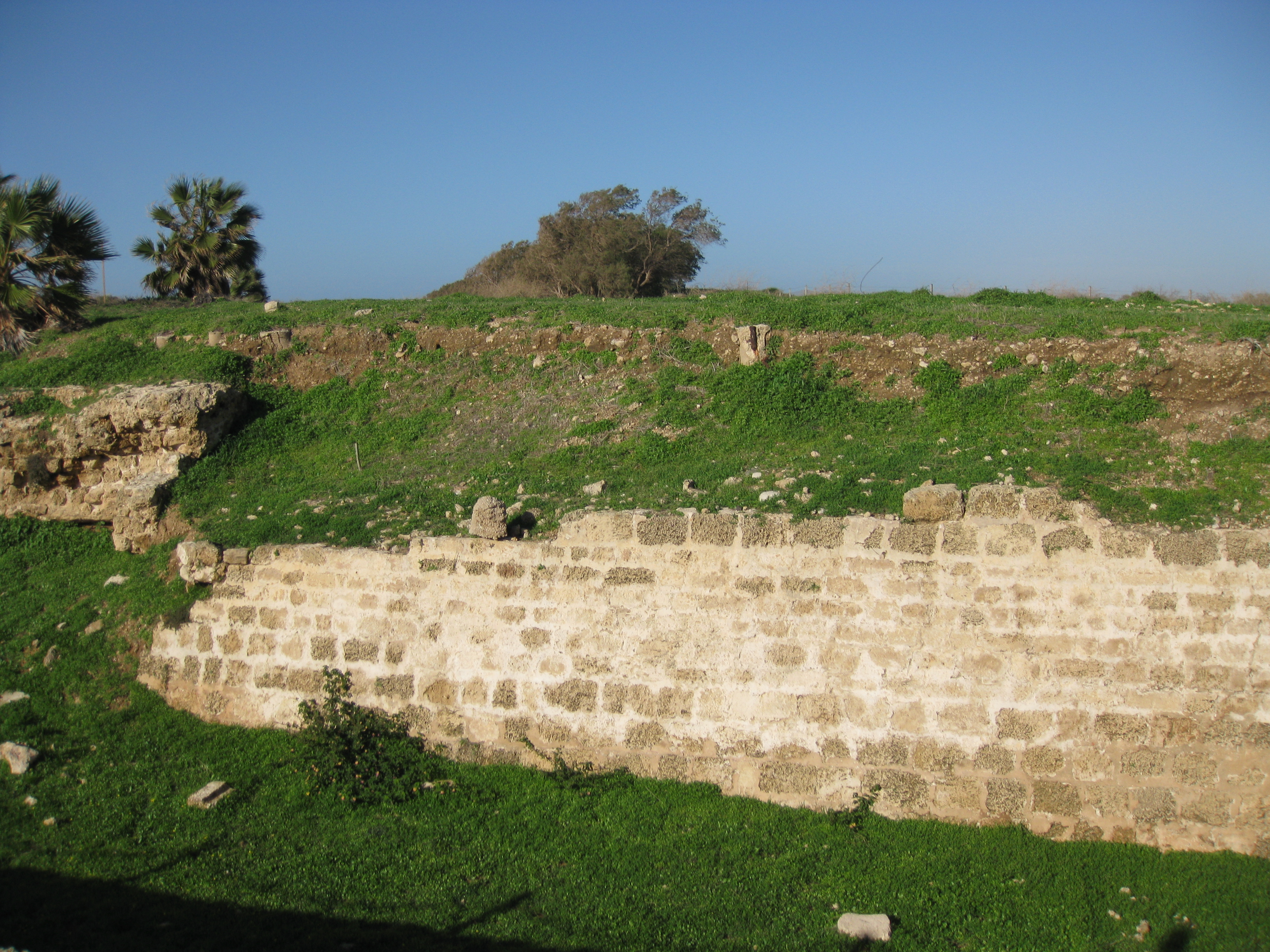 Apollonia חומות העיר הצלבניות גן לאומי אפולוניה (ארסוף)